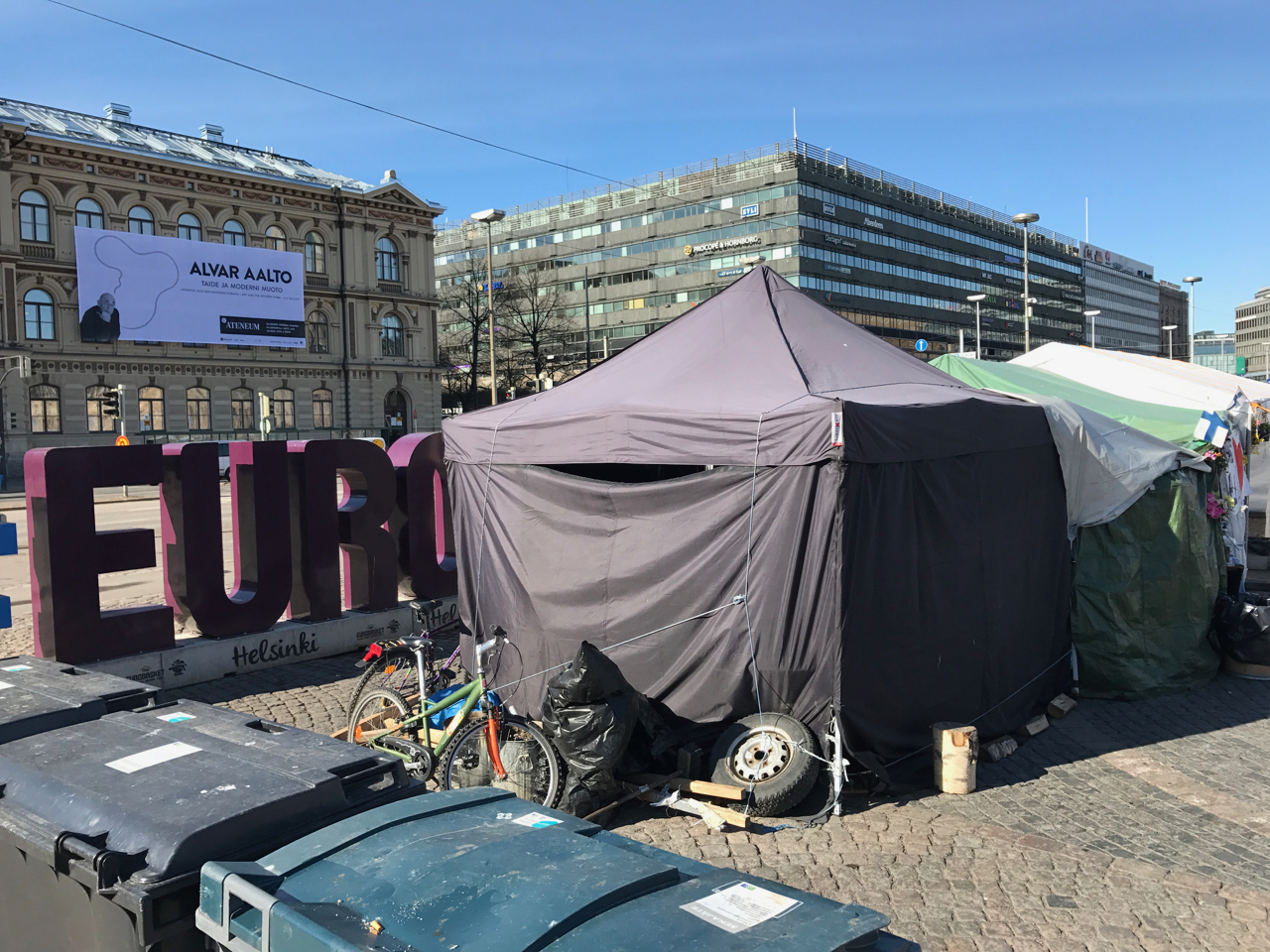 Helsingin #Eurobasket2017-teos ulkomaalaisten leirin peittämänä